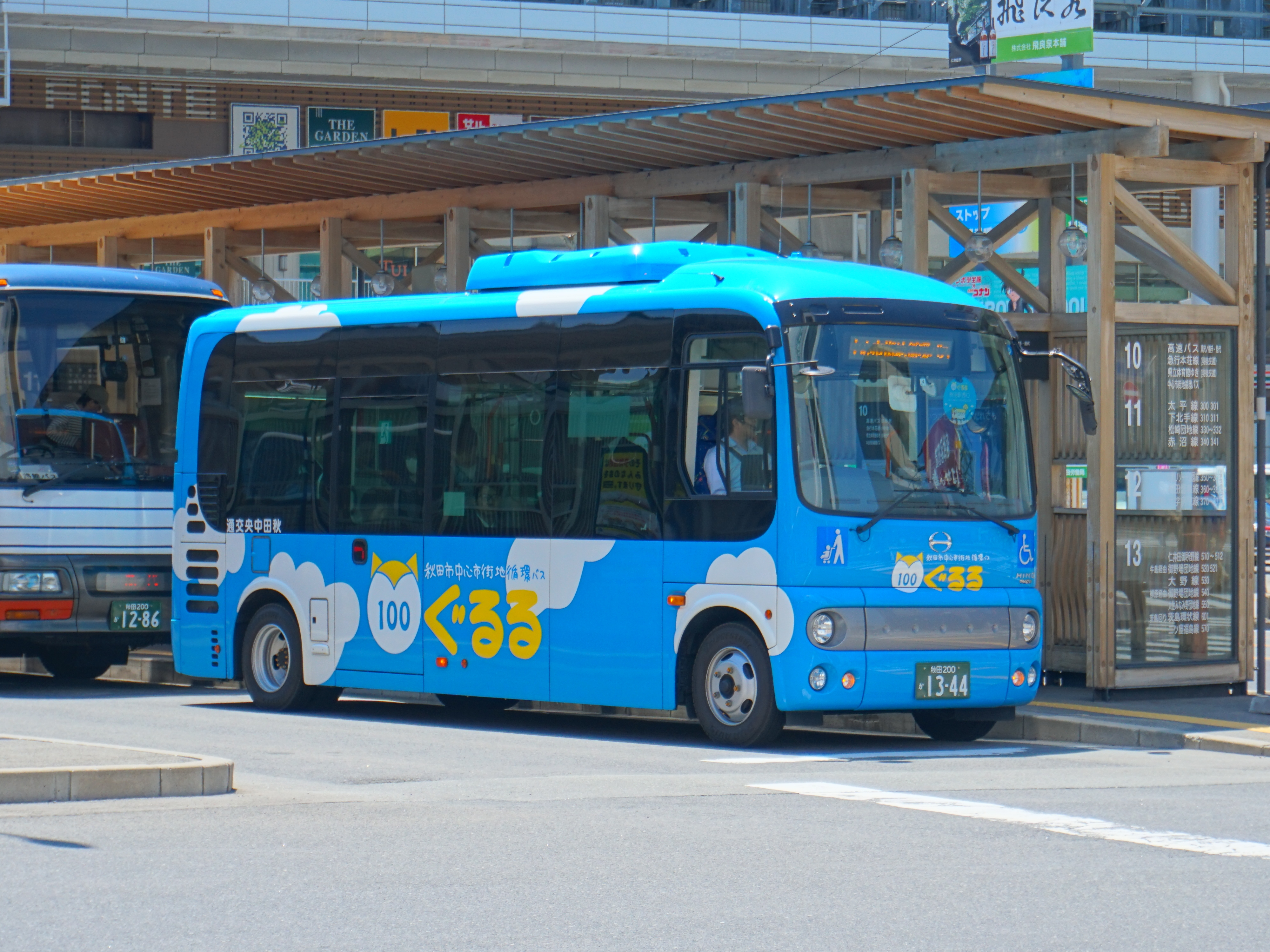 秋田市中心市街地循環バス「ぐるる」（秋田駅西口にて）。日中20分間隔で運行し、運賃は均一100円。秋田市が事業主体となり、秋田中央交通に運行を委託している。